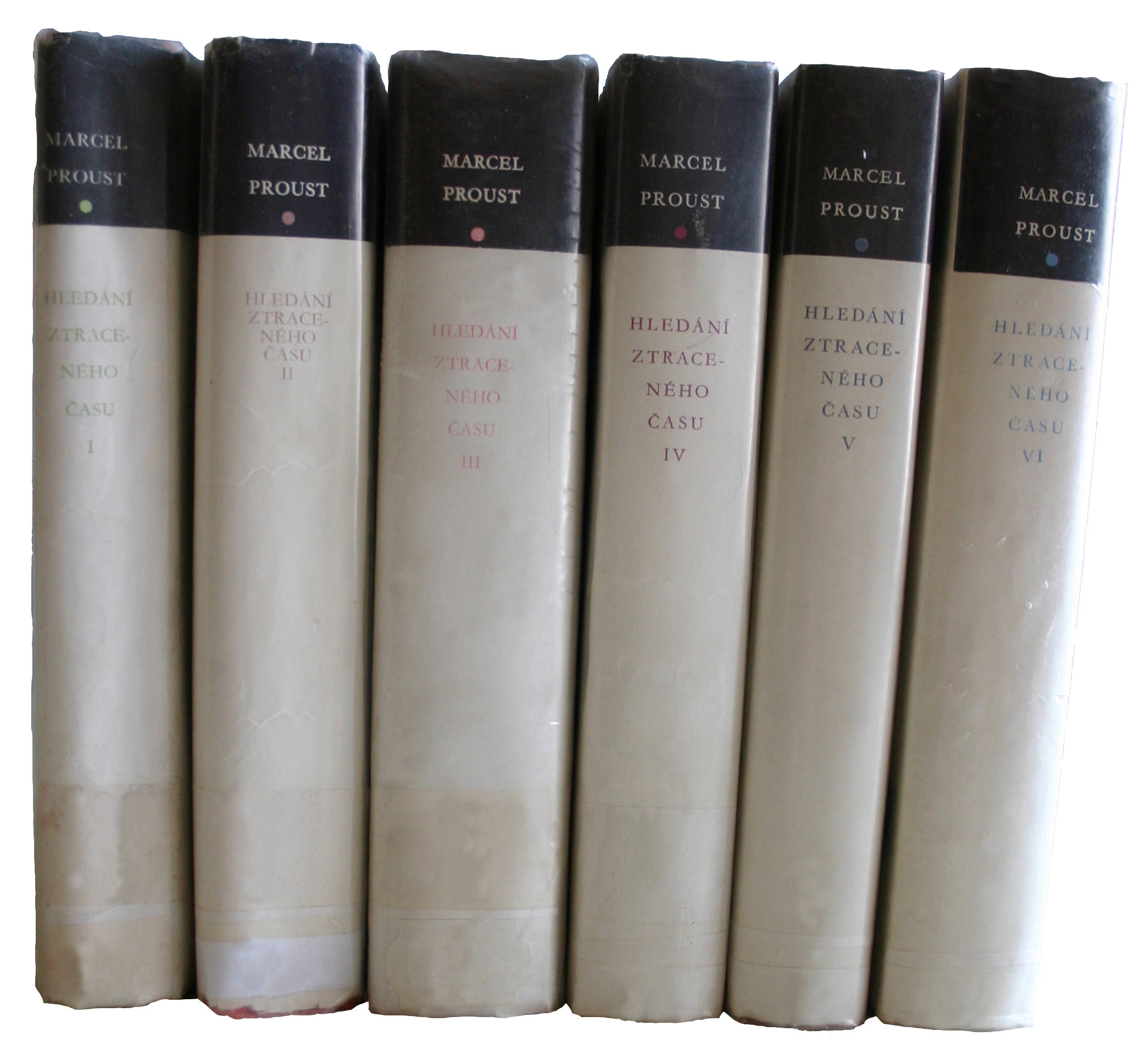 Edition tcheque de Marcel Proust, A la recherche du temps perdu